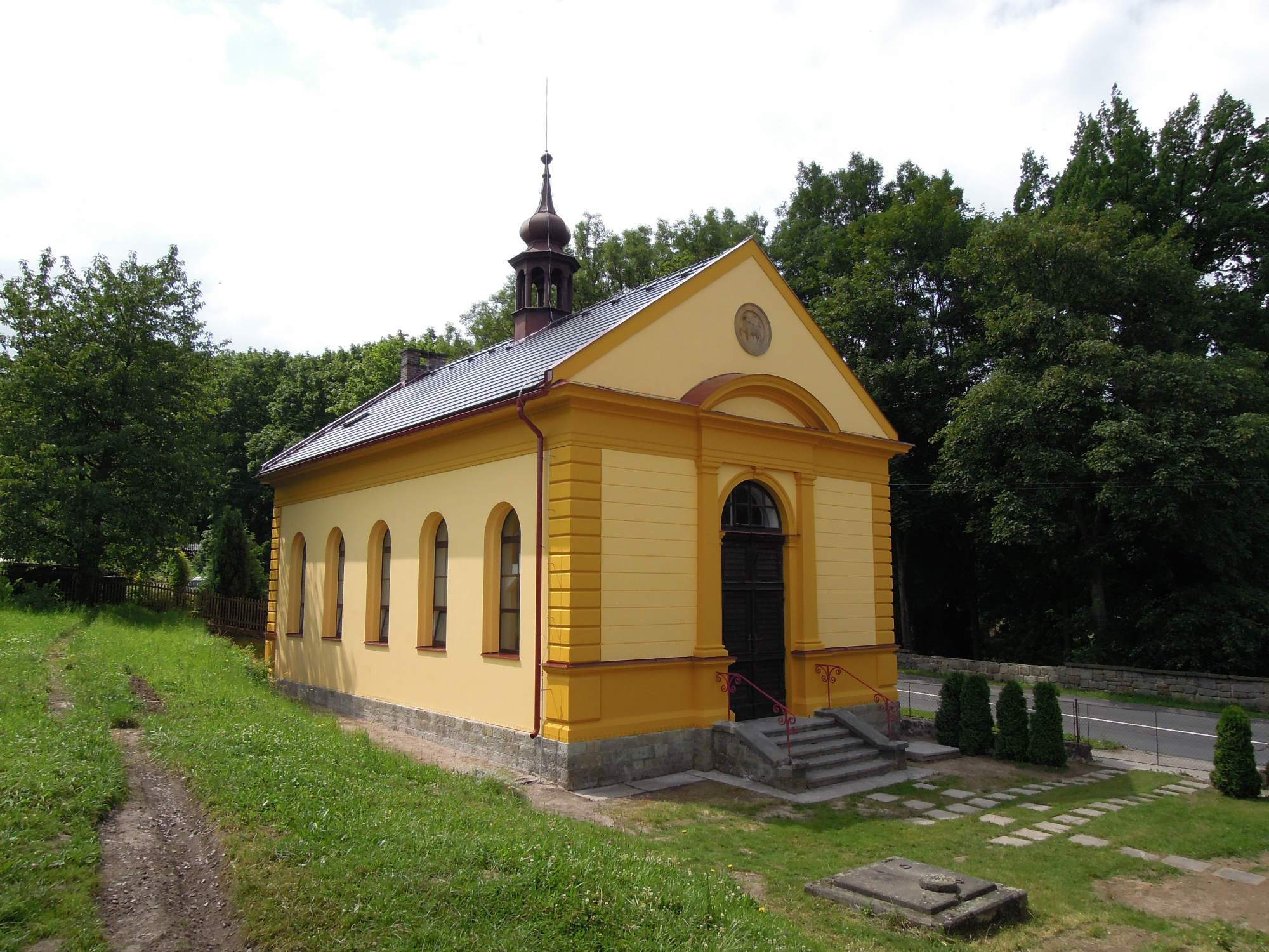 Kostel obnovené Jednoty bratrské v Potštejně